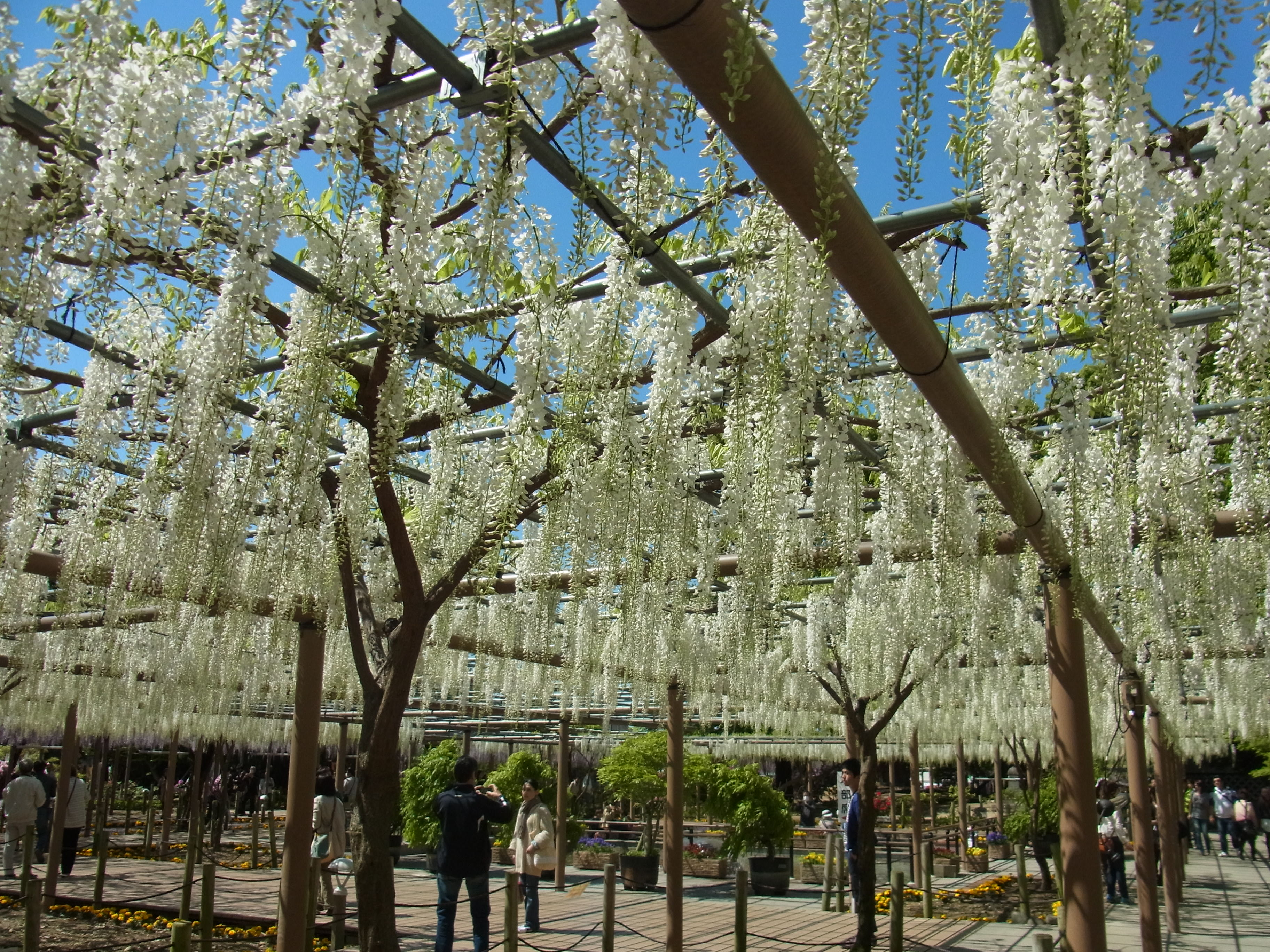 曼荼羅寺藤まつり